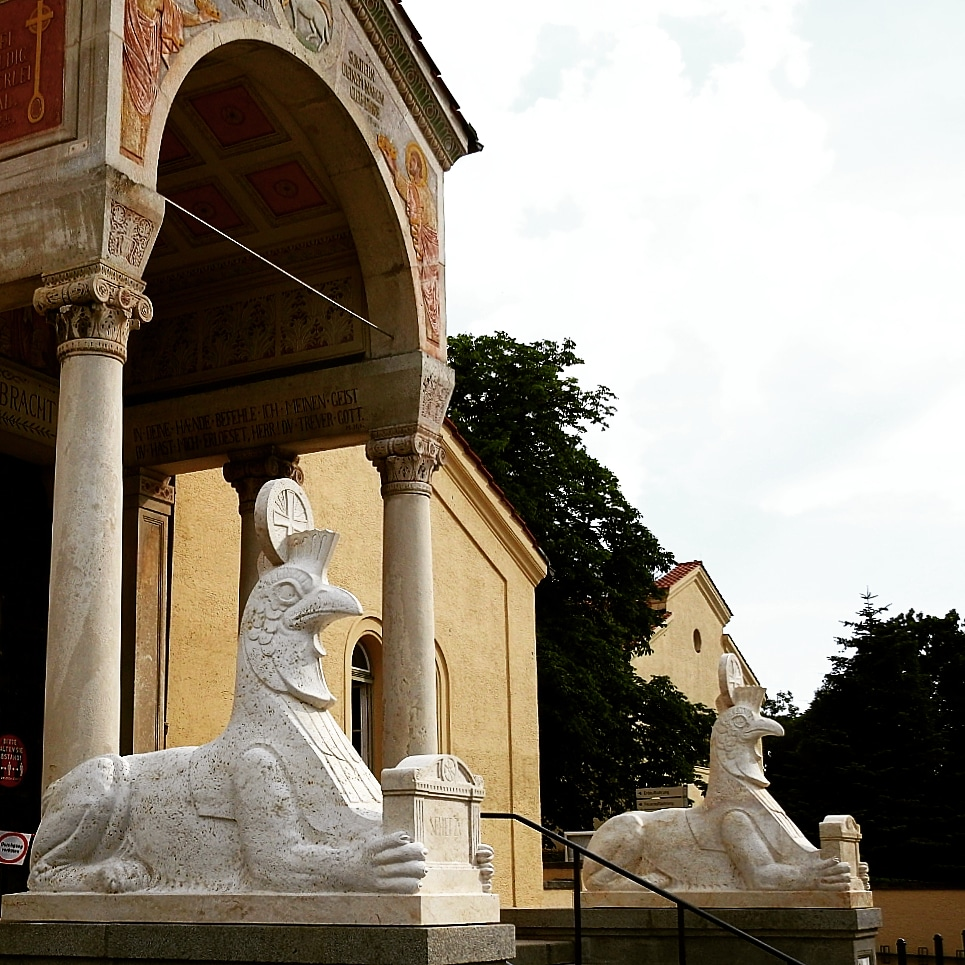 Rekonstruktion beider Sphingen vor der Aussegnungshalle am Nordfriedhof München 2020